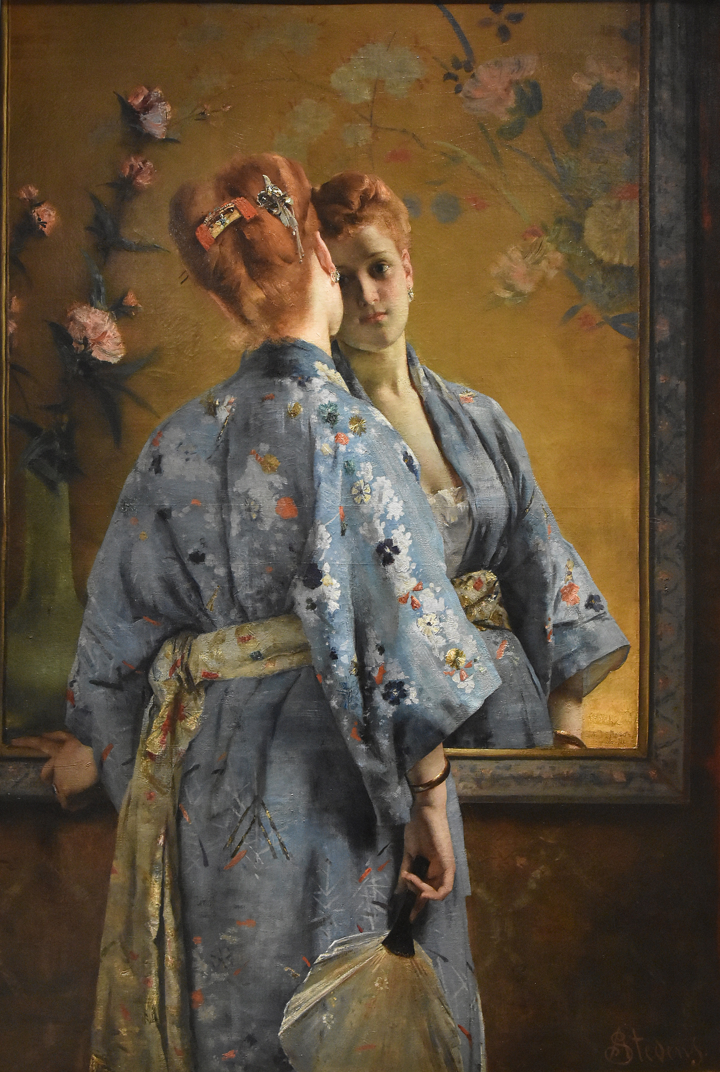 Alfred Stevens (1823-1906) La Parisienne Japonaise - La Boverie Luik 23-08-2018 This photo of movable heritage has been taken in the Walloon Region